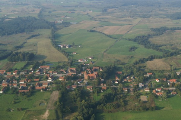 Barczewko